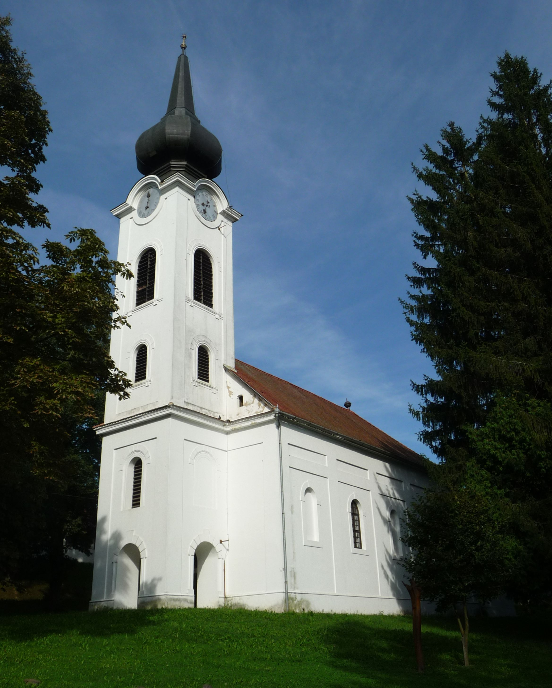 Református templom, Őriszentpéter